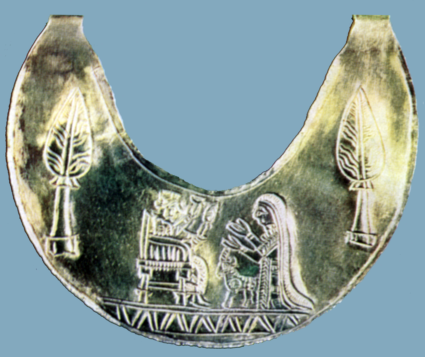 Urartian carcanet